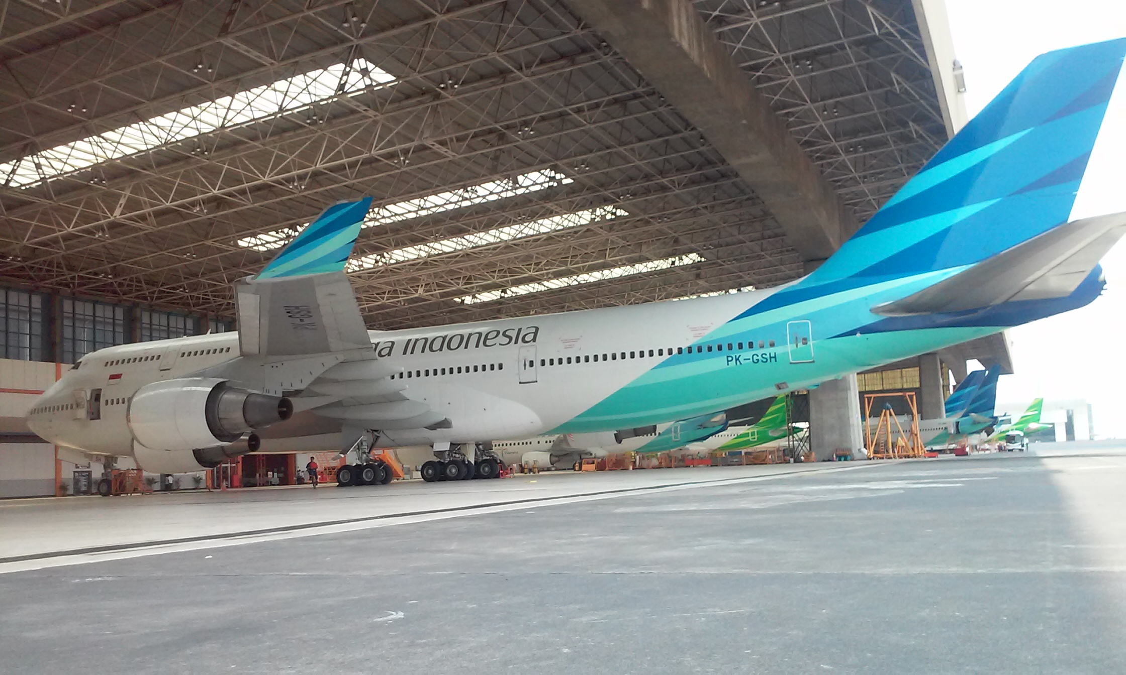 Garuda Indonesia Boeing 747-400 at GMF AeroAsia Hanggar 2, Soekarno-Hatta International Airport